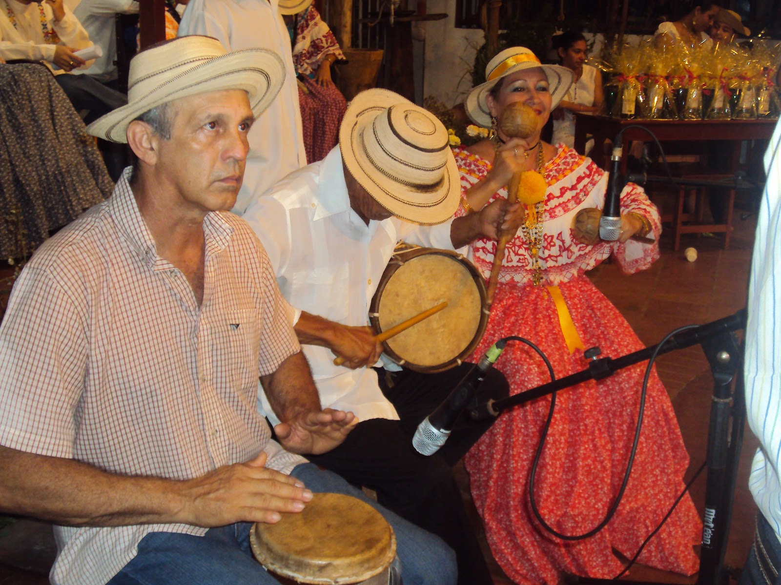 Santeños con sombrero pintado.